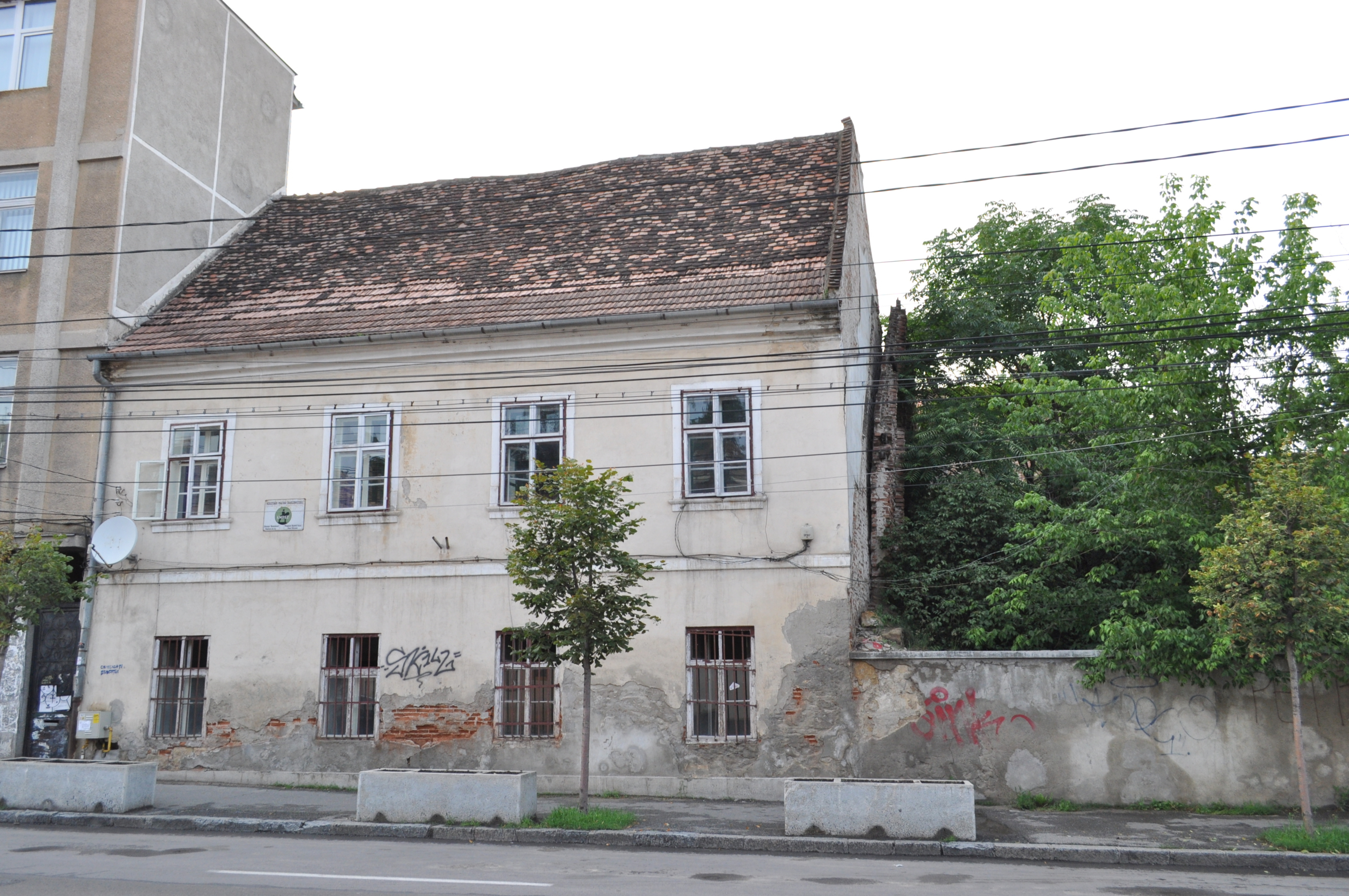 Clădire monument istoric, strada Avram Iancu nr. 21